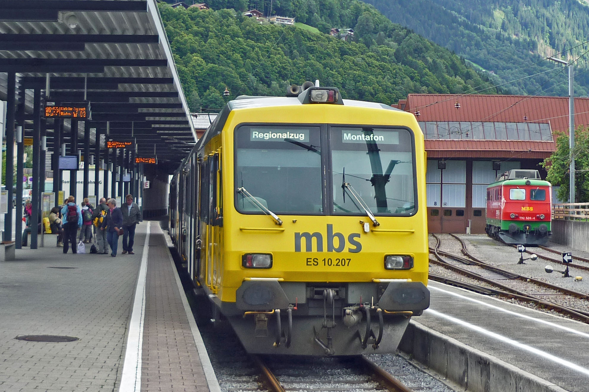 Montafonerbahn Bludenz - Schruns, hier im Bahnhof Schruns